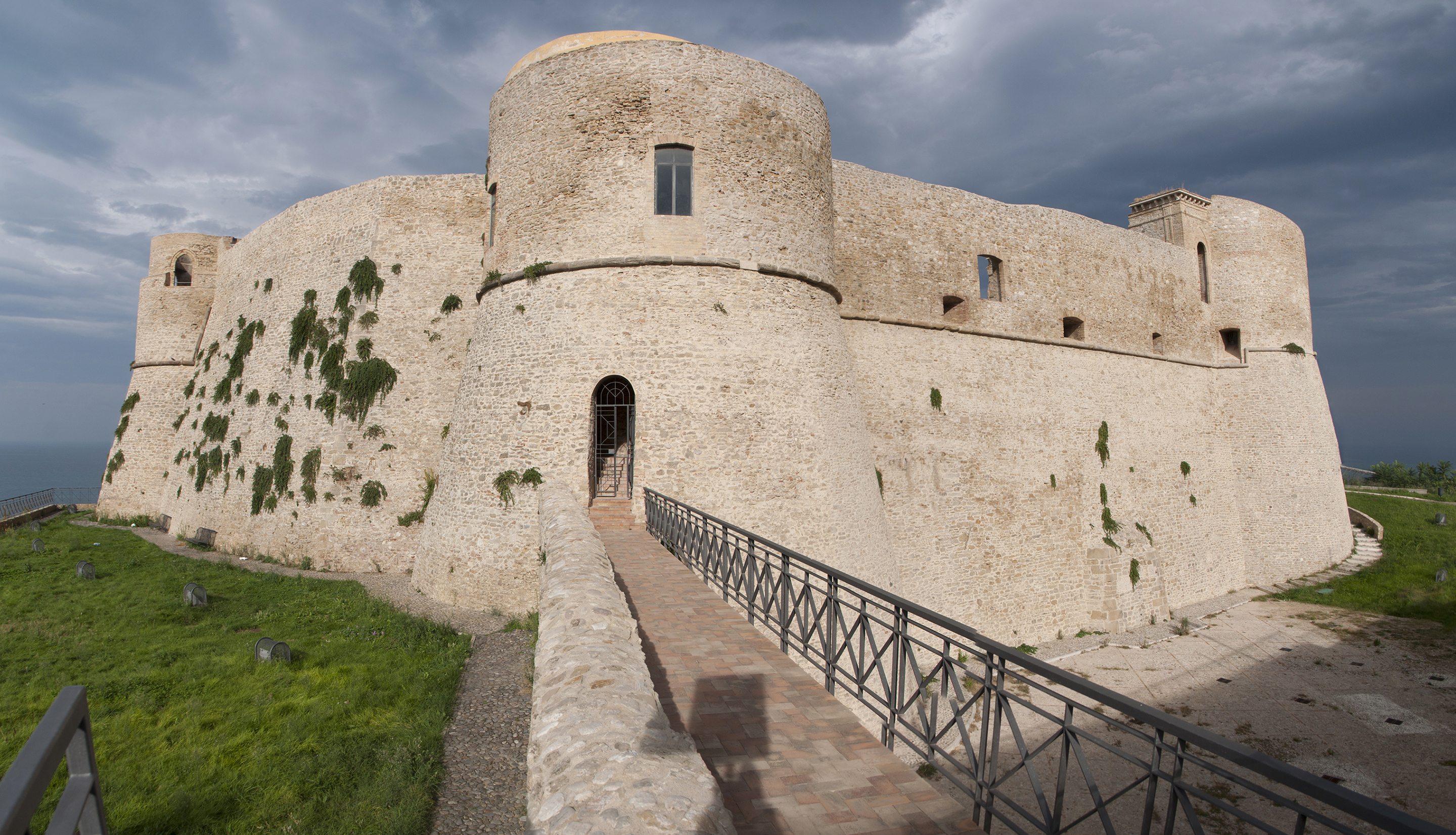 Castello Aragonese This is a photo of a monument which is part of cultural heritage of Italy.